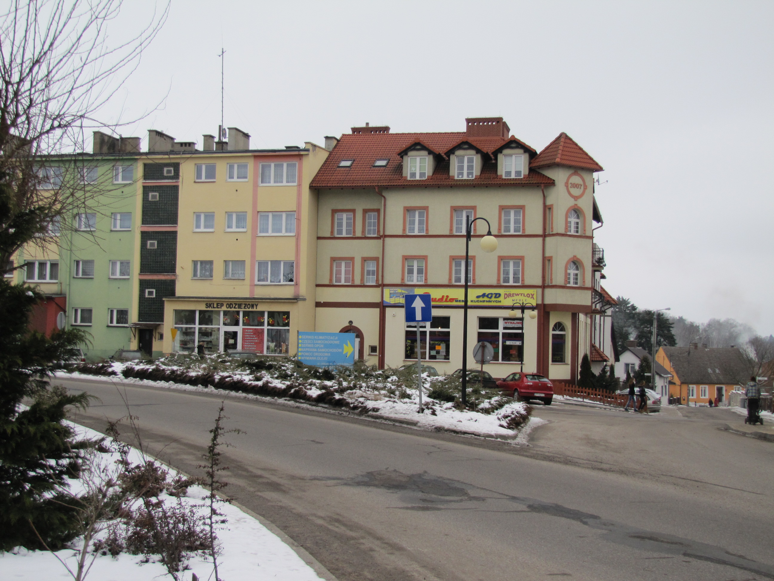 Sklepy przy Rynku.